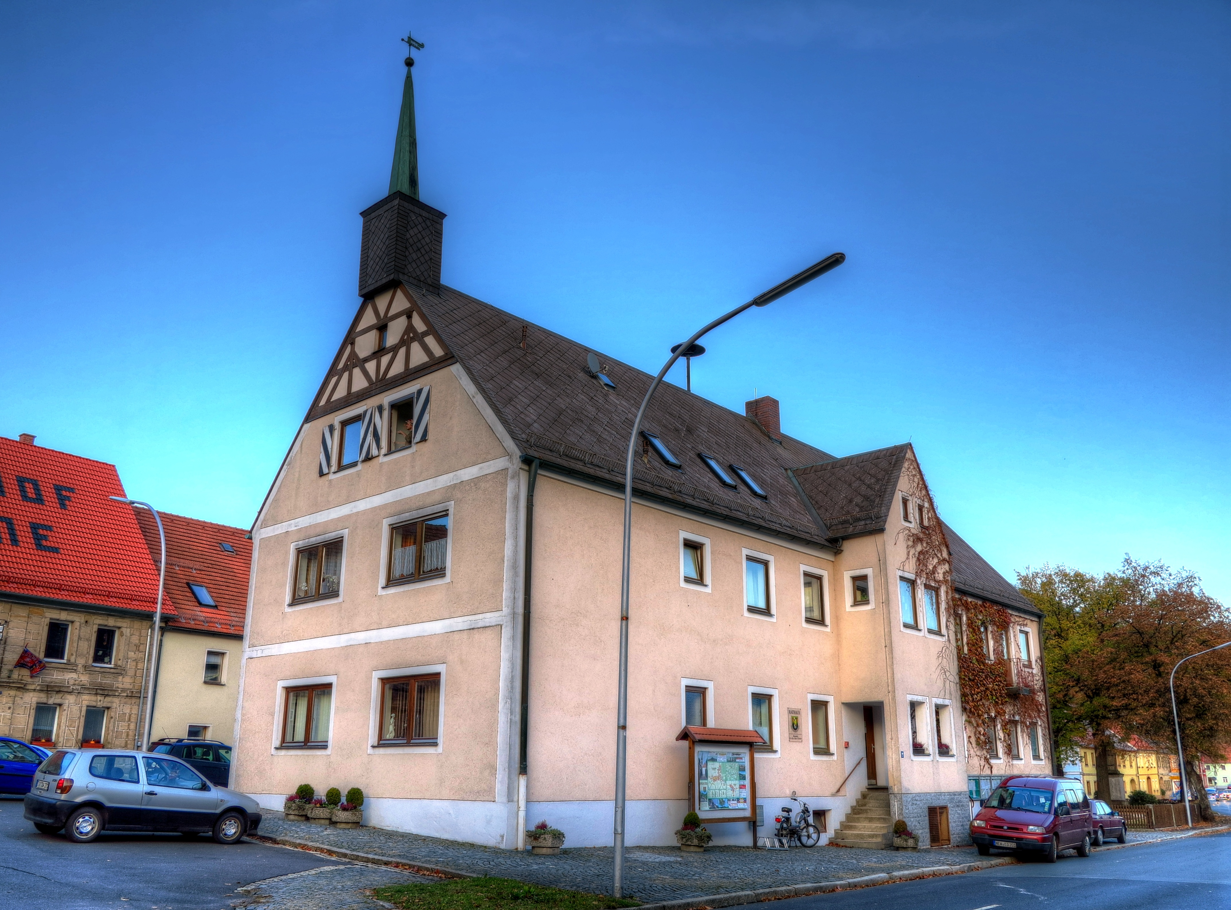 Deutschland, Bayern, Oberpfalz, Neustadt am Kulm, Rathaus